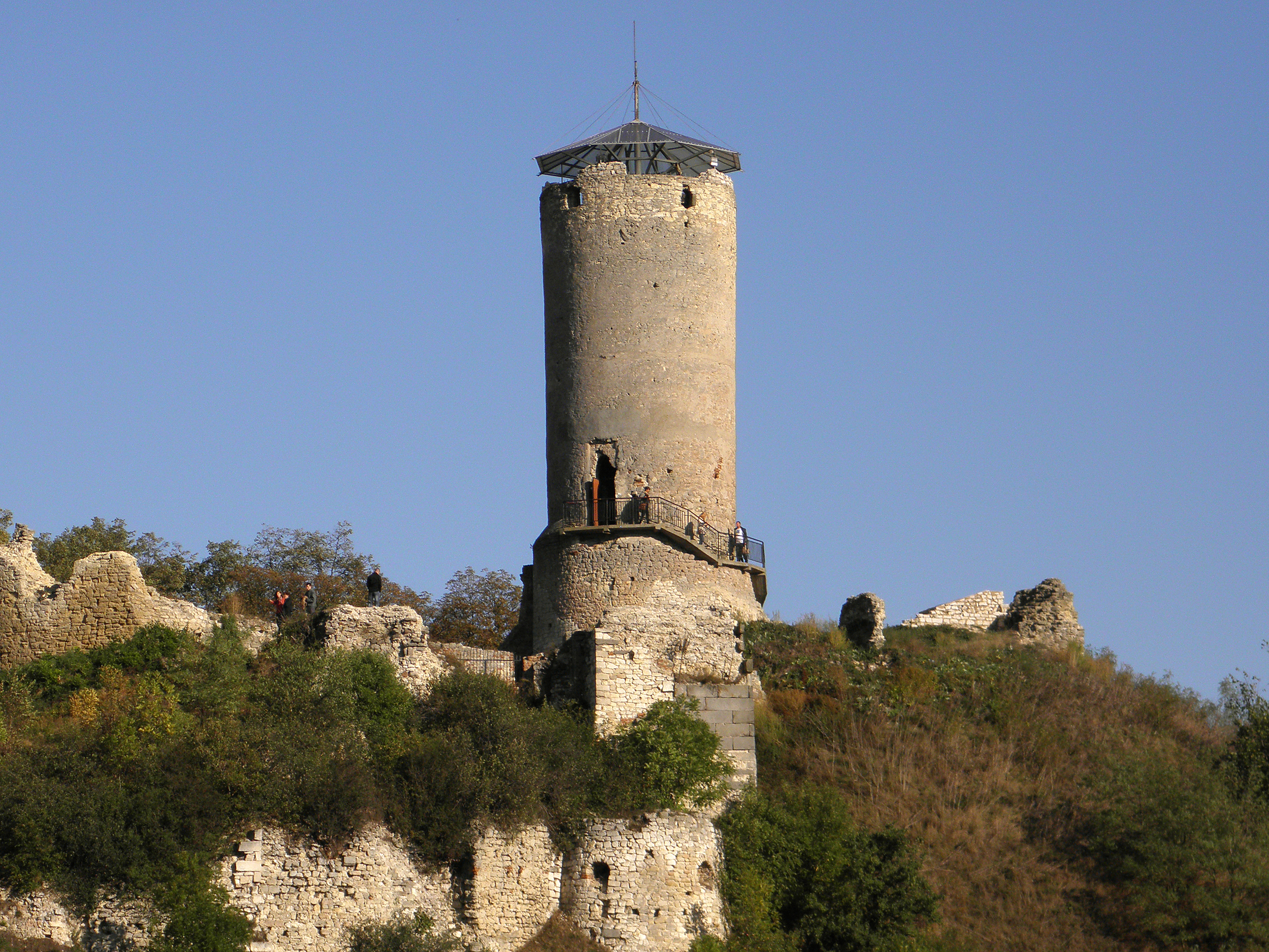 Ruiny zamku w Iłży.